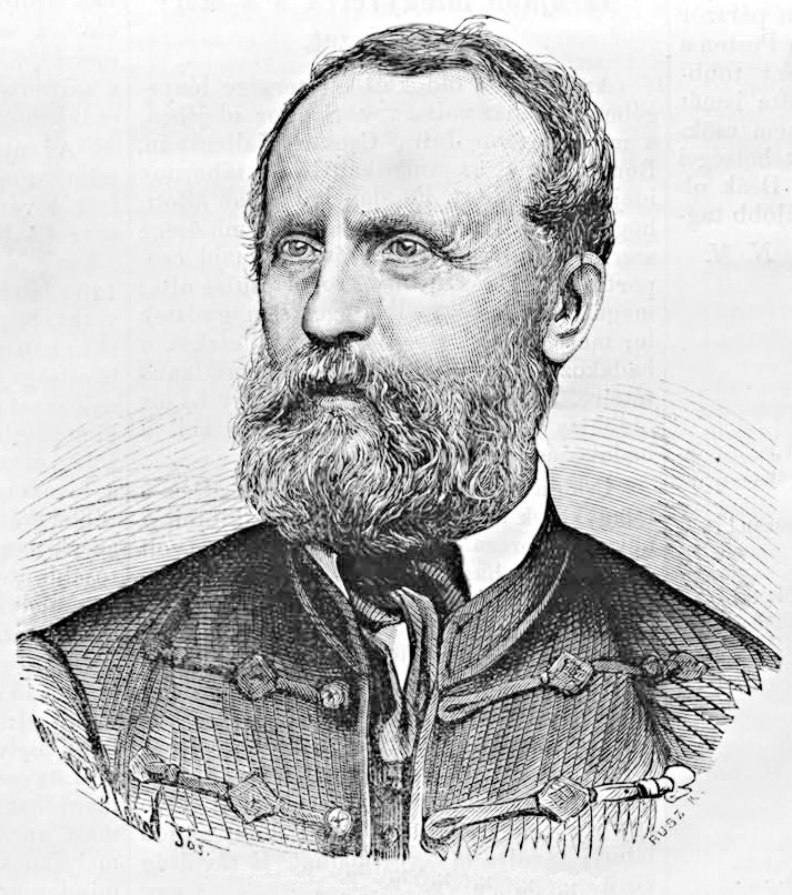 Szentkirályi Móric (1807–1882) politikus, Pest főpolgármestere portréja. Rusz Károly metszete Marastoni József rajza alapján